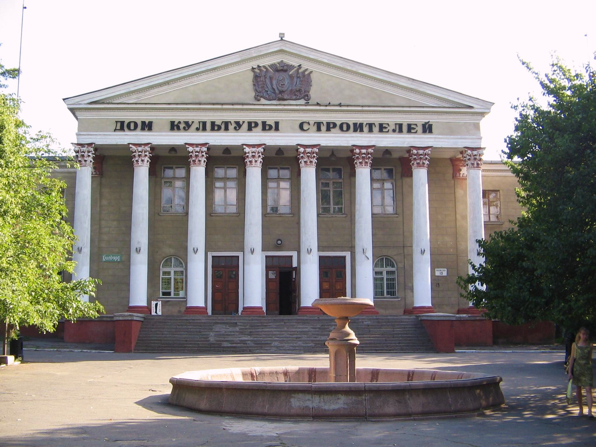 Дом культуры строителей (Николаев)